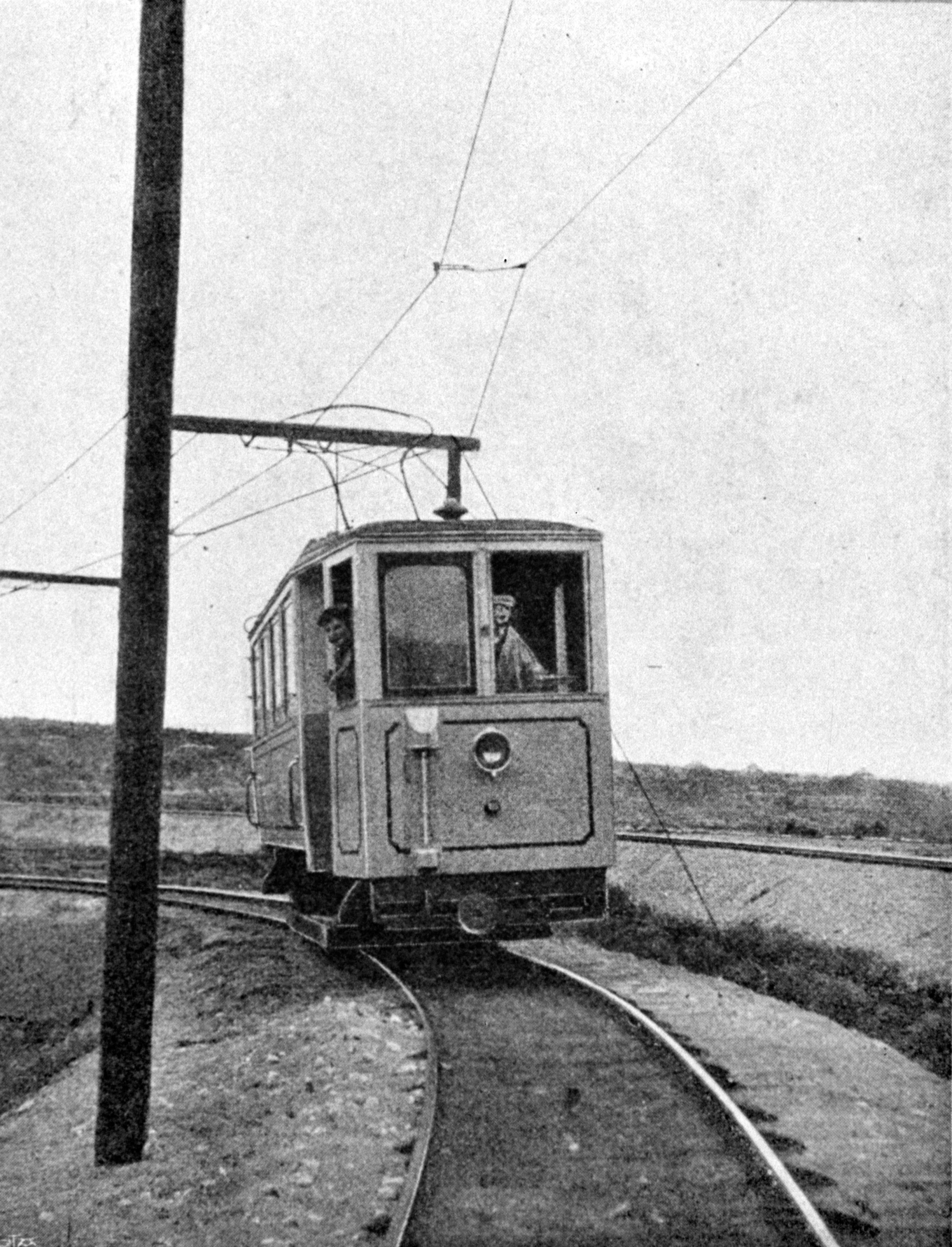 Spårvagn mellan Bergforsen och Snickarverkstaden i Kiruna.